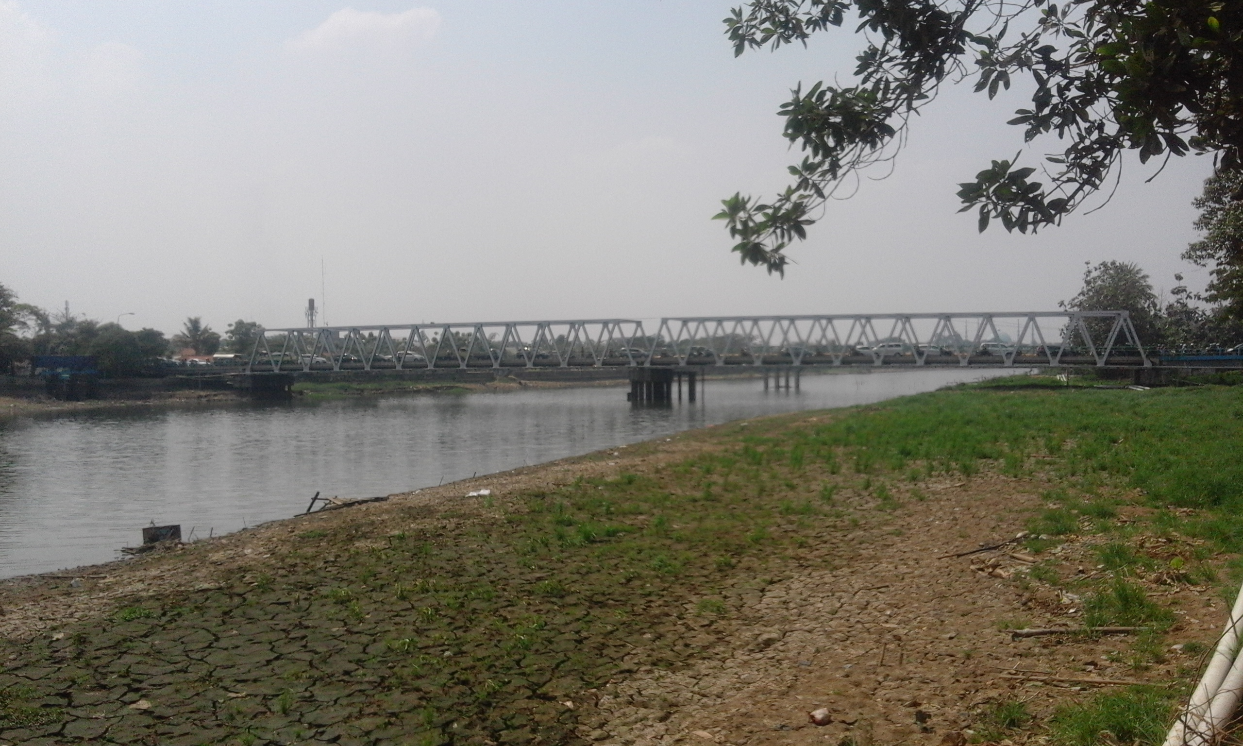 jembatan cisadane pintu 10